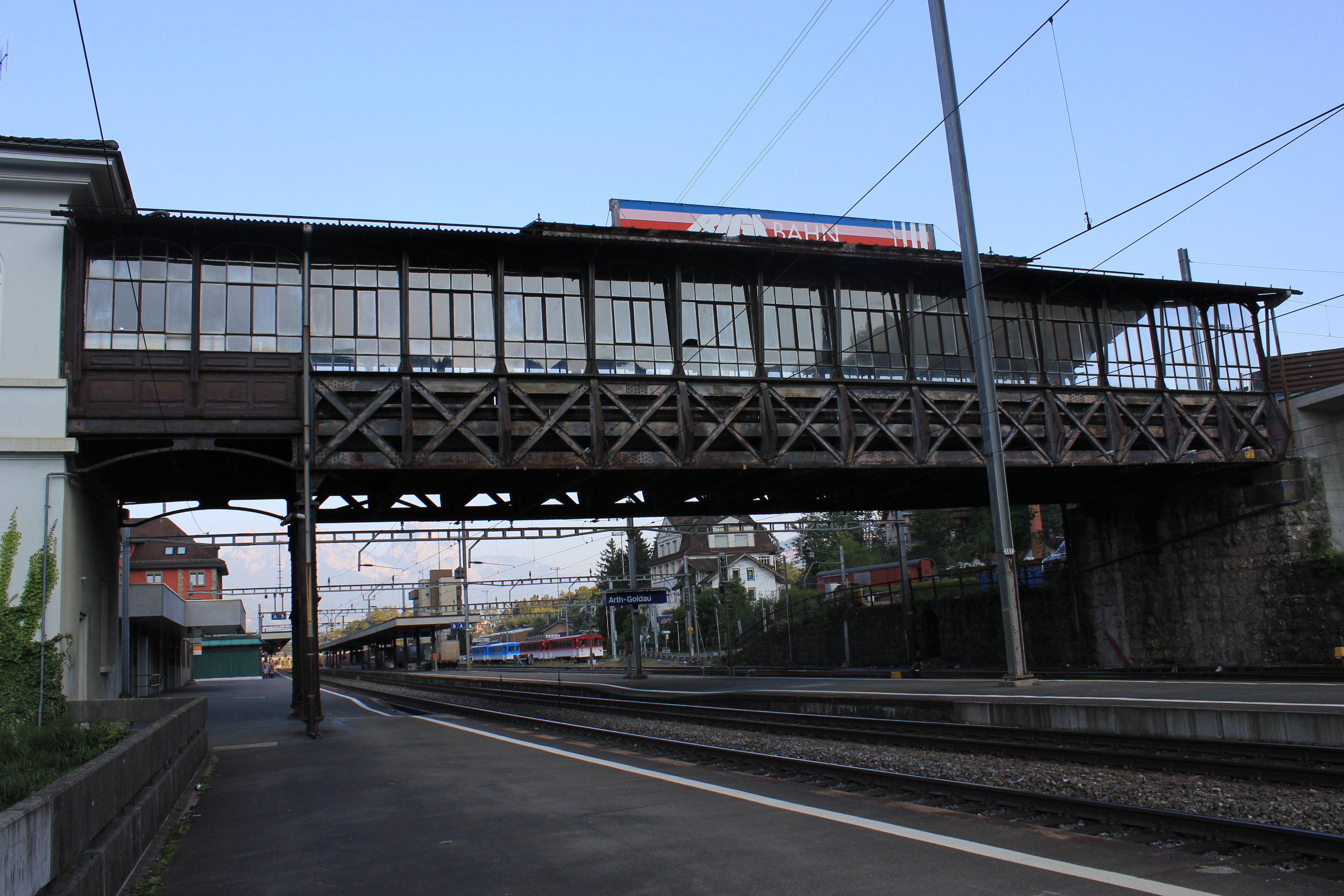 Hochperronbrücke der Arth-Rigi-Bahn am Bahnhof Arth-Goldau, erbaut 1897